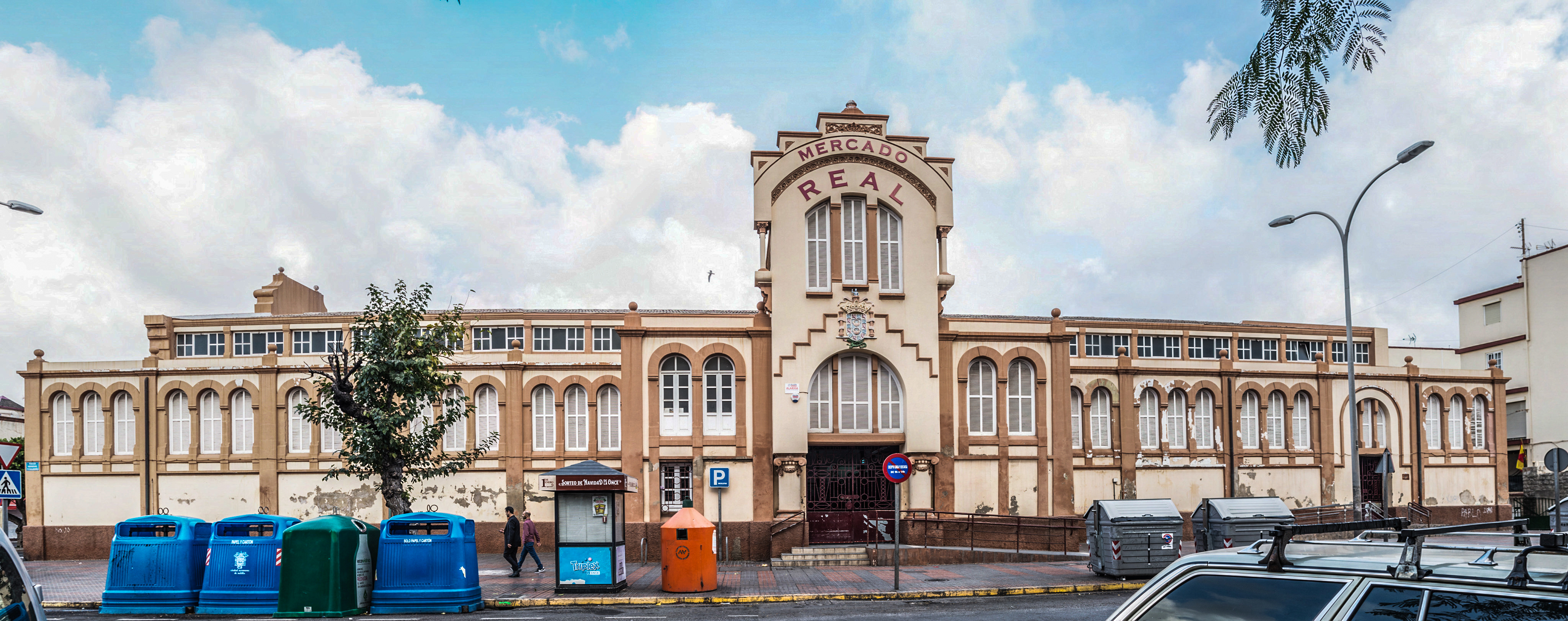 Mercado del Real. Melilla (1932-1940).